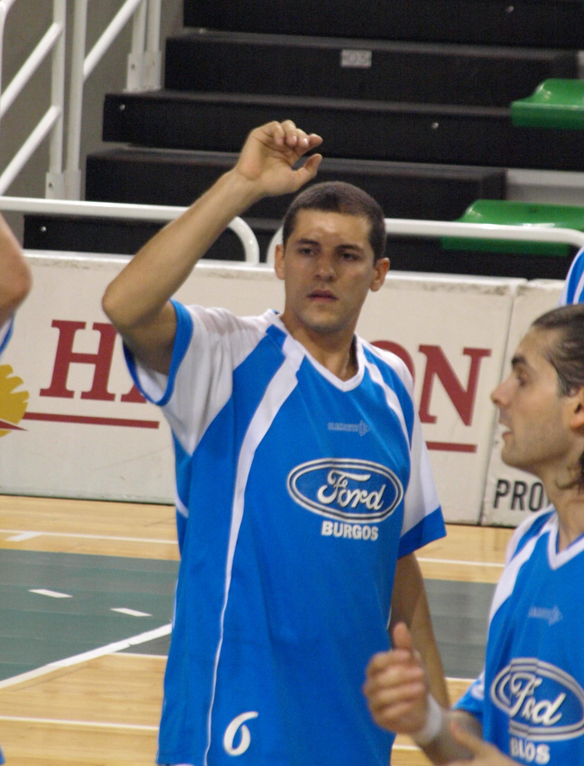 Iván Corrales, con la camiseta del Autocid Ford Burgos en el primer partido de la temporada 2008-09 disputado en el Pabellón Multiusos de Cáceres ante el Cáceres 2016 Basket